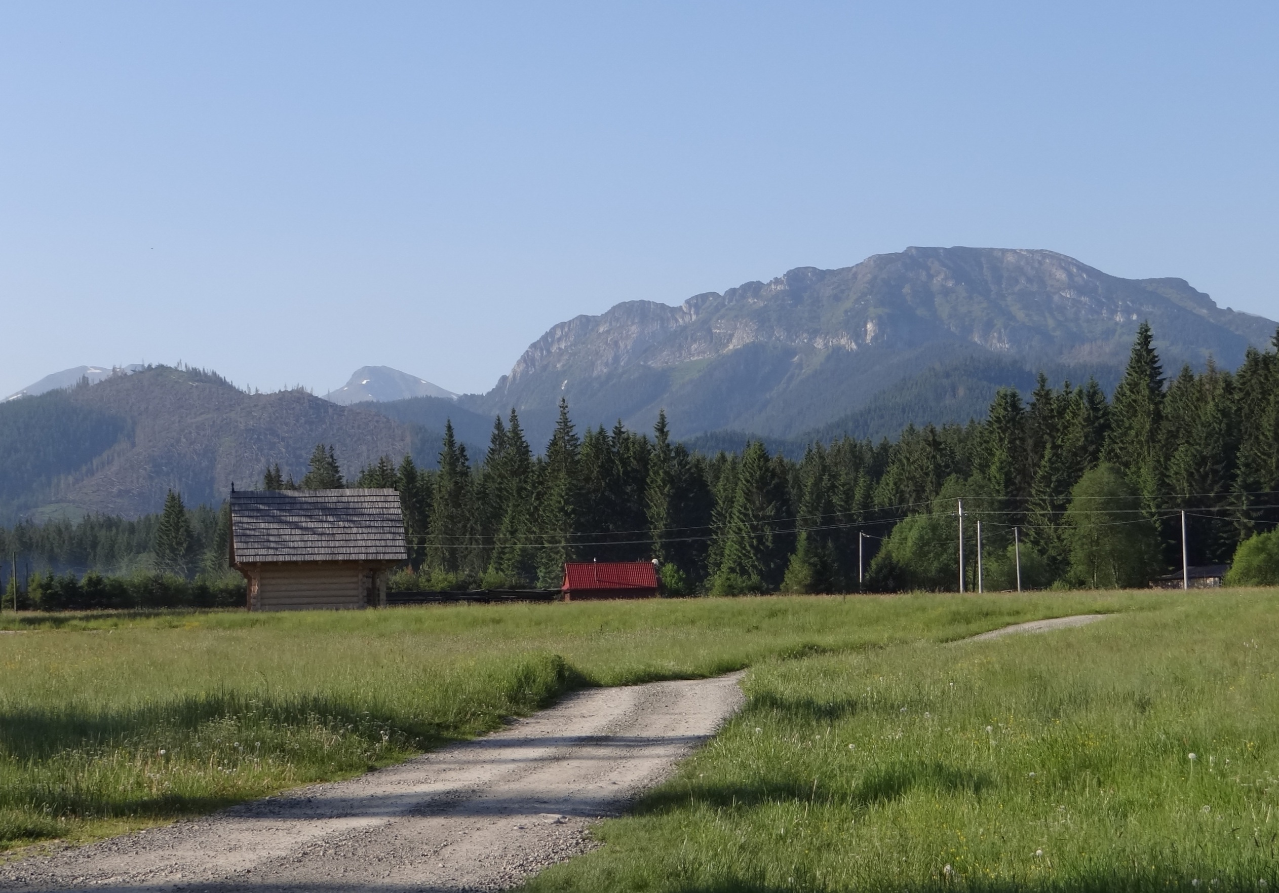 Baligówka w Witowie